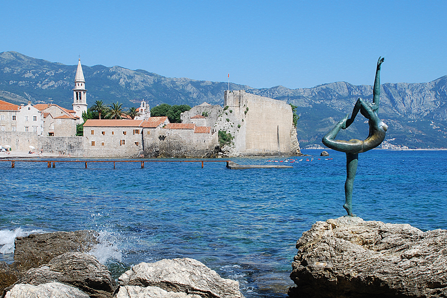 Будва